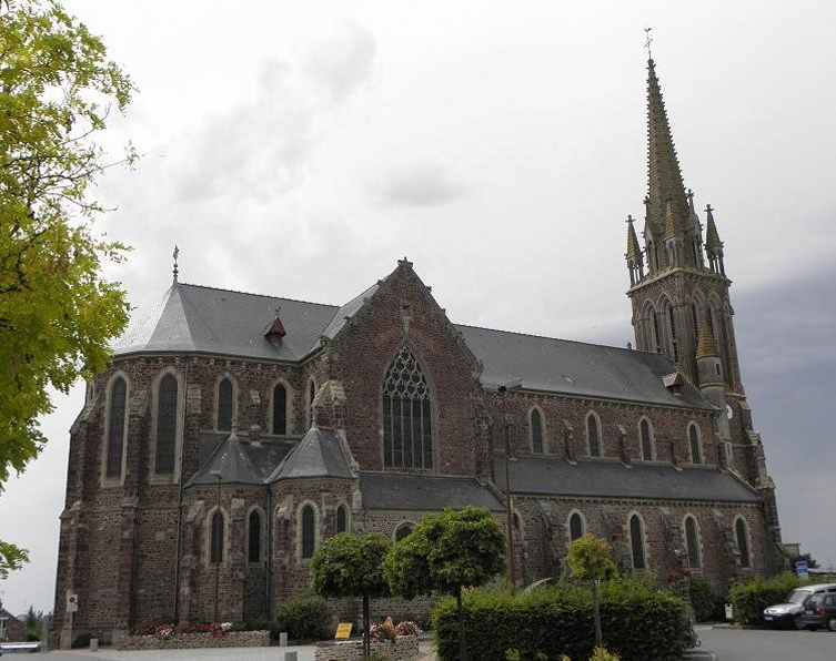 Chevet et flanc nord de l'église Saint-Pierre et Saint-Louis de Bédée (35).